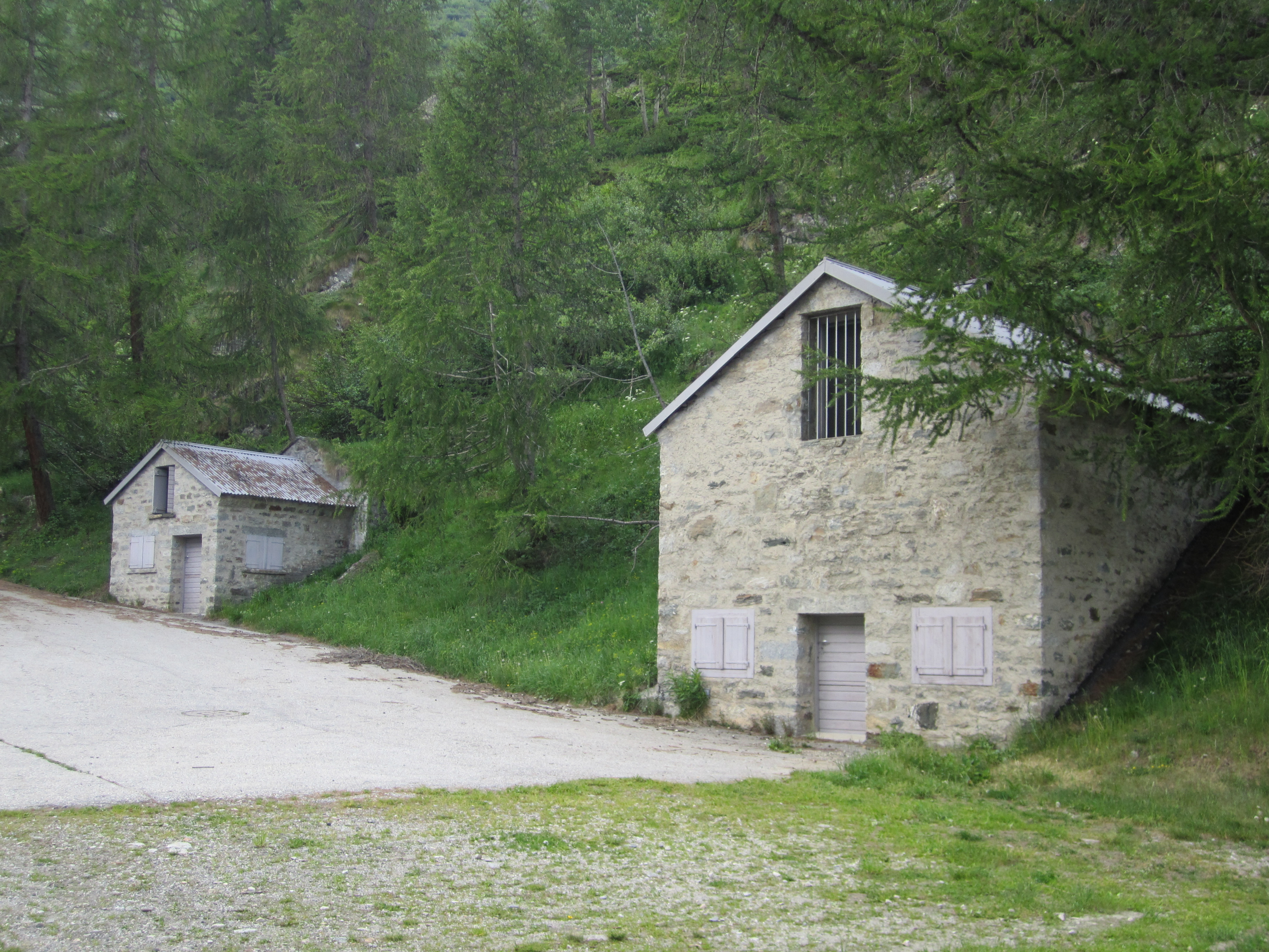 Eingang Foppa Grande (links)